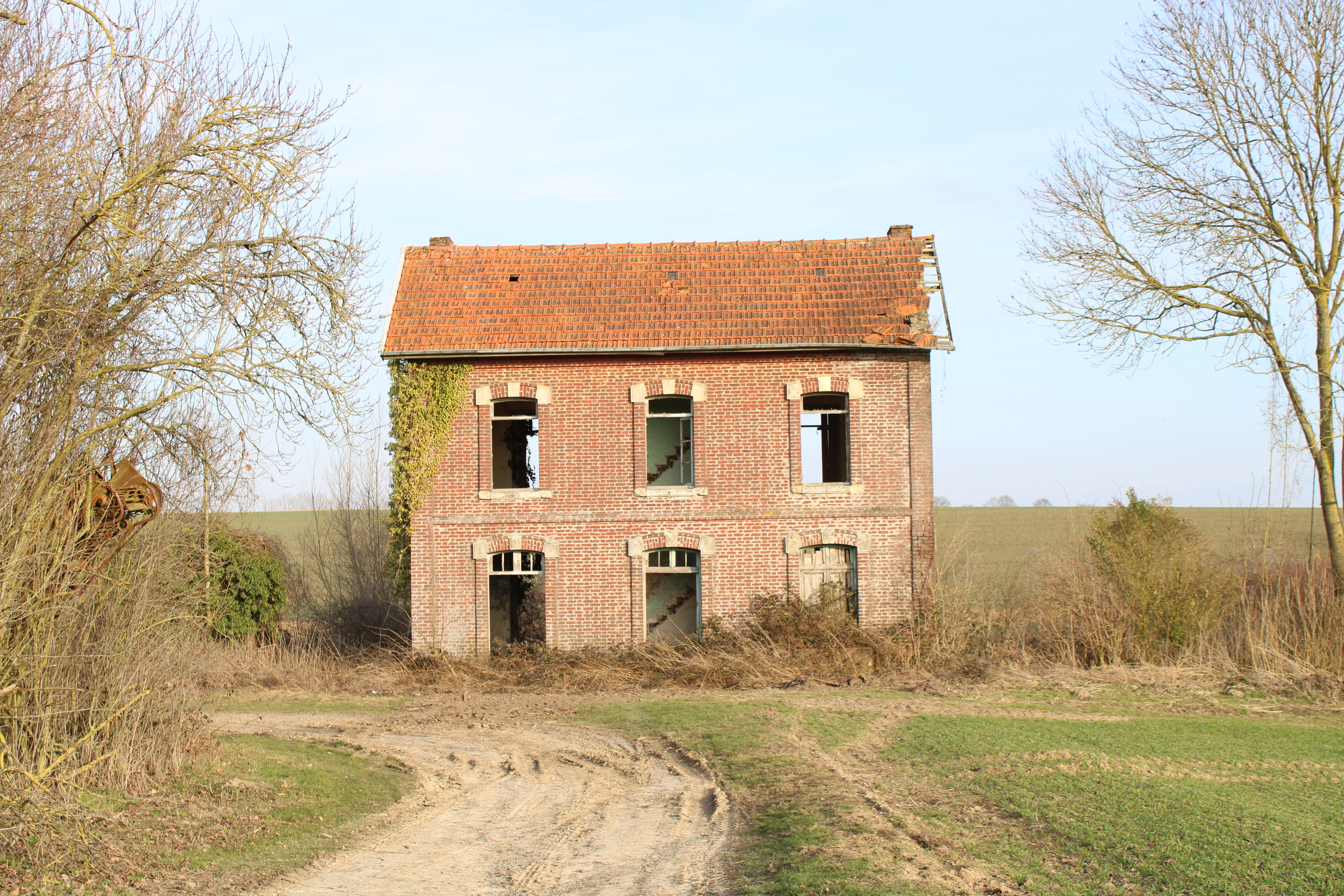 L'ancienne gare de Douilly.